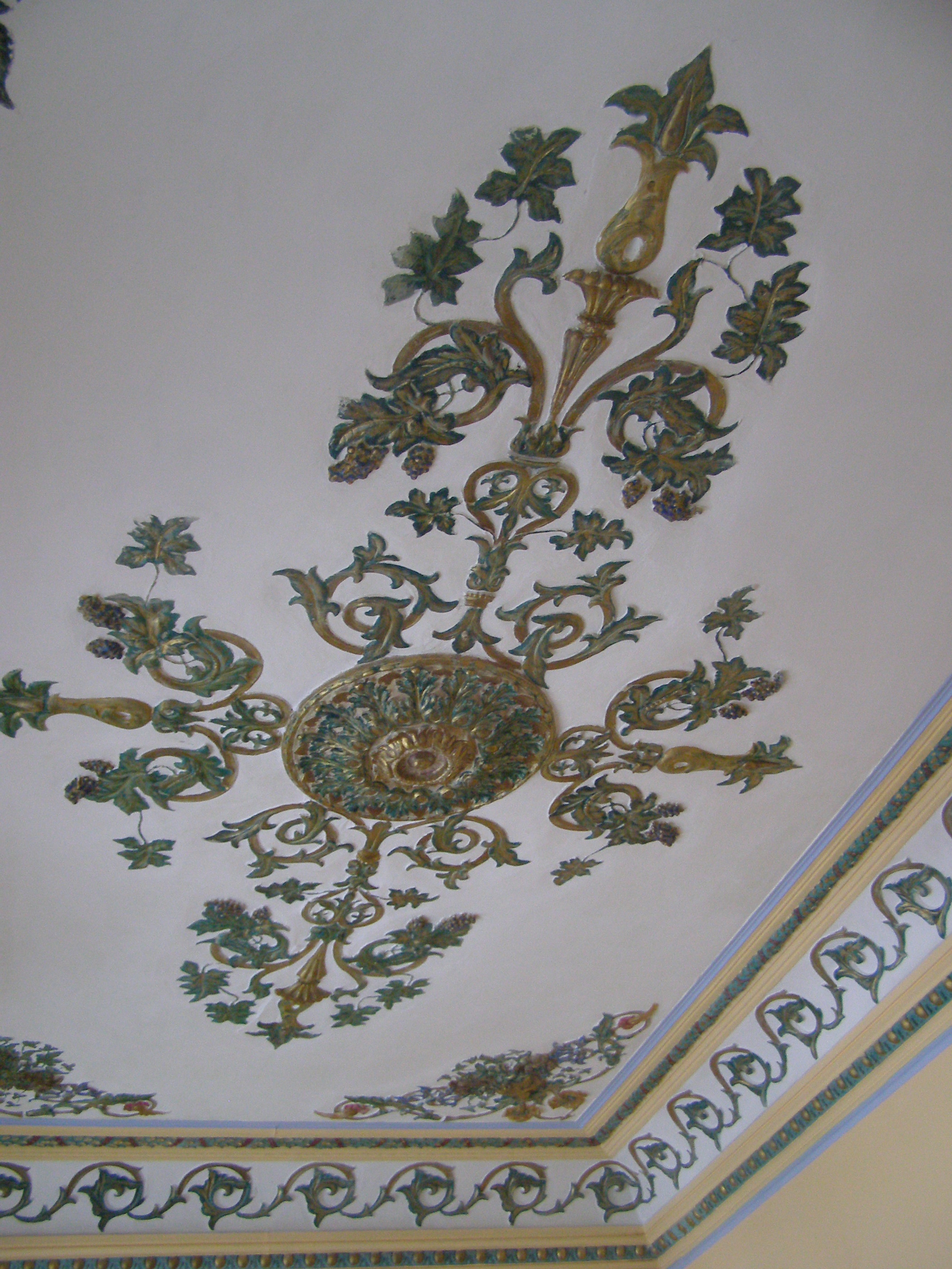 Садиба Неплюєвих, Глухів, вул. Києво-Московська, 43